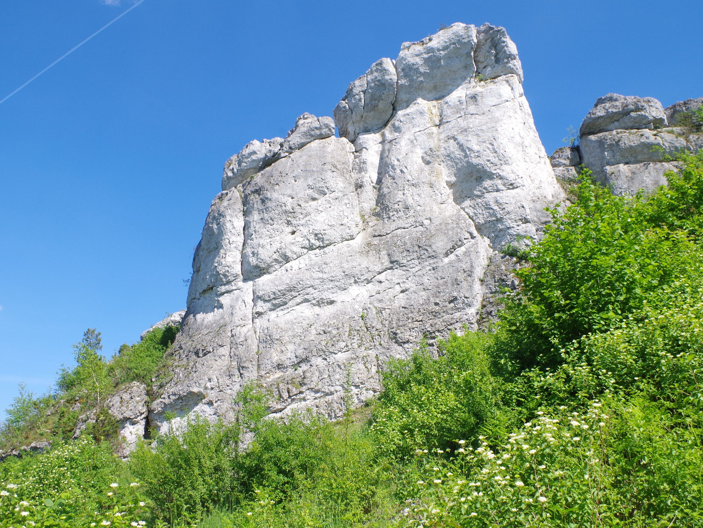 Urwista Turnia na wzgórzu Lipówki w Olsztynie